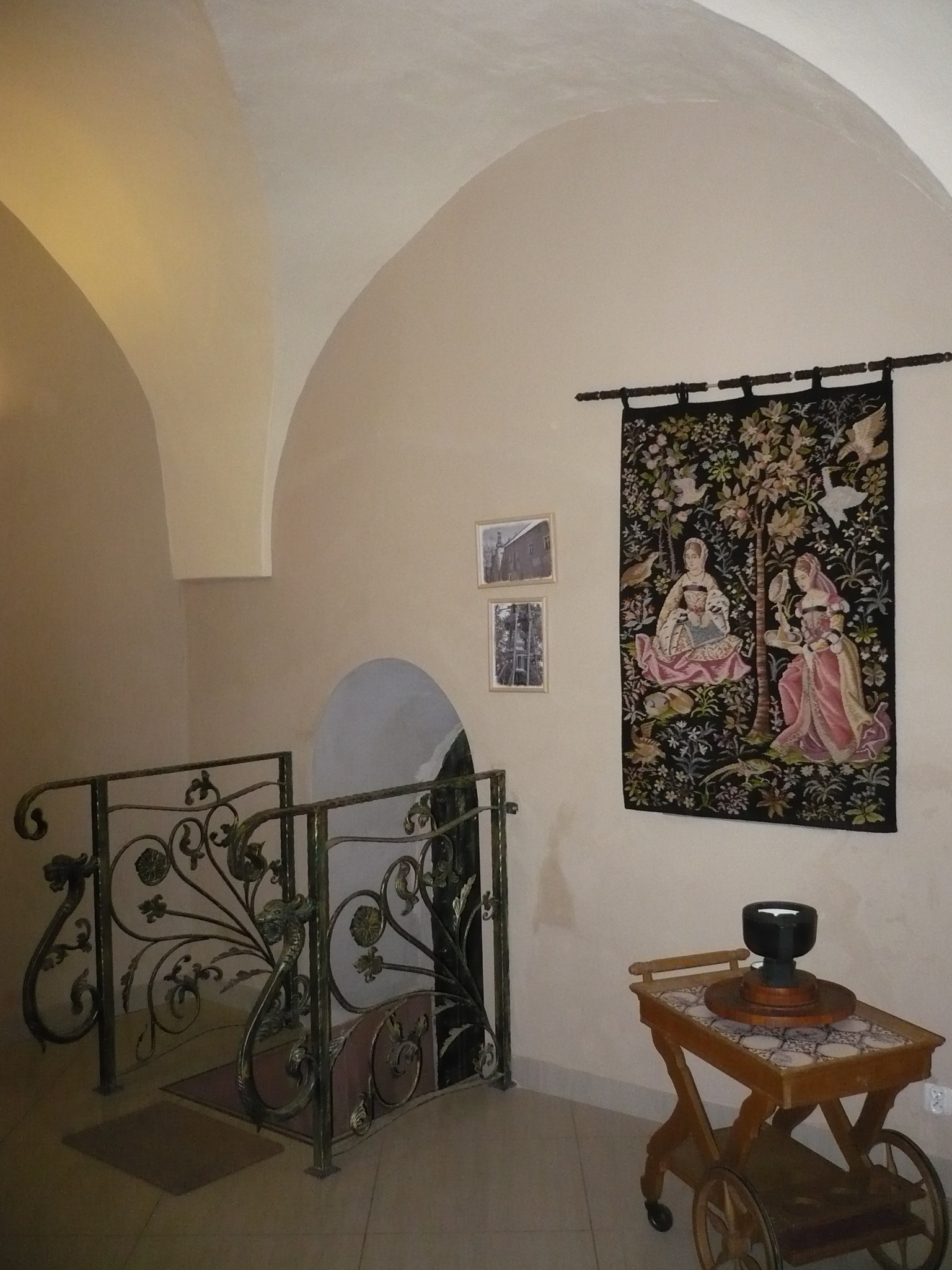 Nowa Ruda, ul. Kościelna 30 - Dwór Górny, obecnie hotel, XVII, XIX w. (zabytek nr A/940/652/WŁ z 25.05.1977)